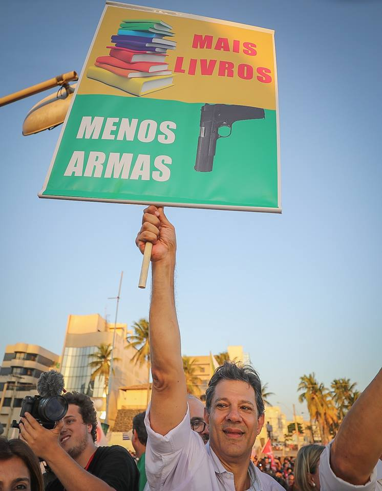 Caminhada da vitória com Haddad em Salvador, às vésperas do segundo turno de 2018